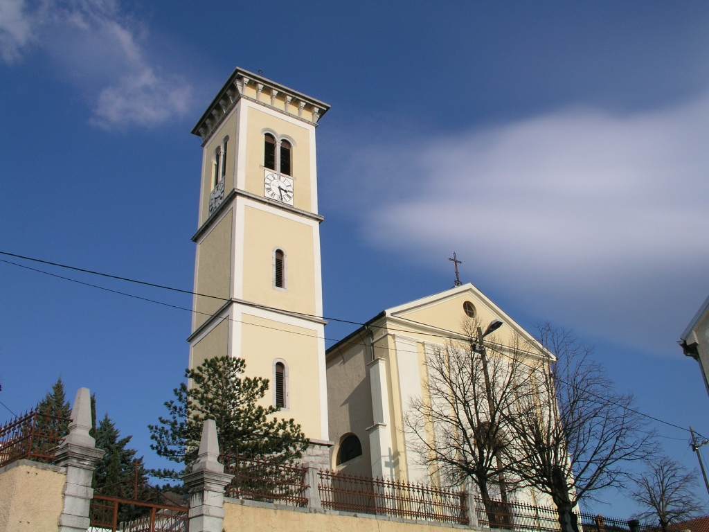 Crkva u Praputnjaku, Hrvatska